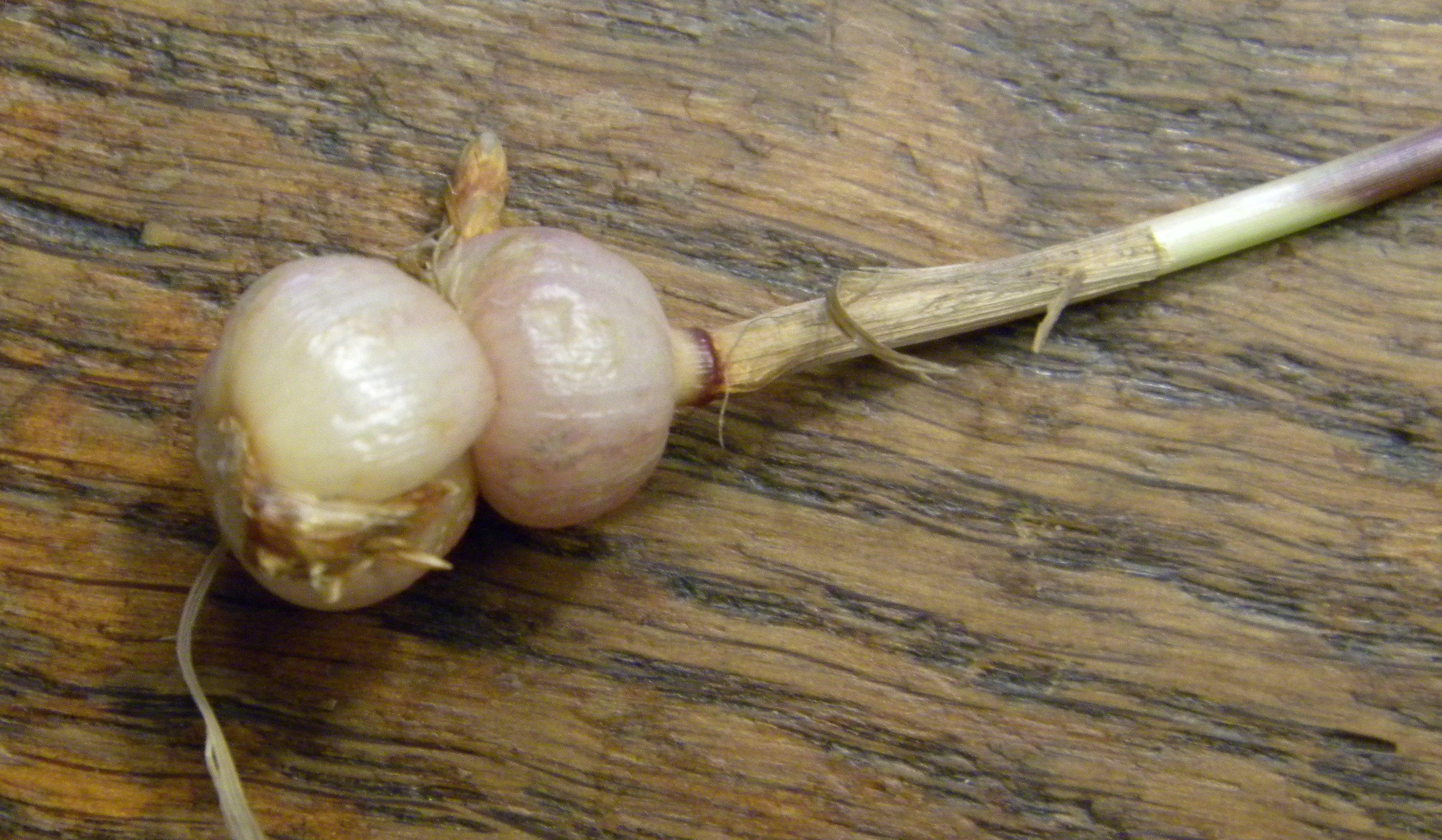 Arrhenatherum elatius subsp. bulbosum (Willd.) Schübler & G.Martens